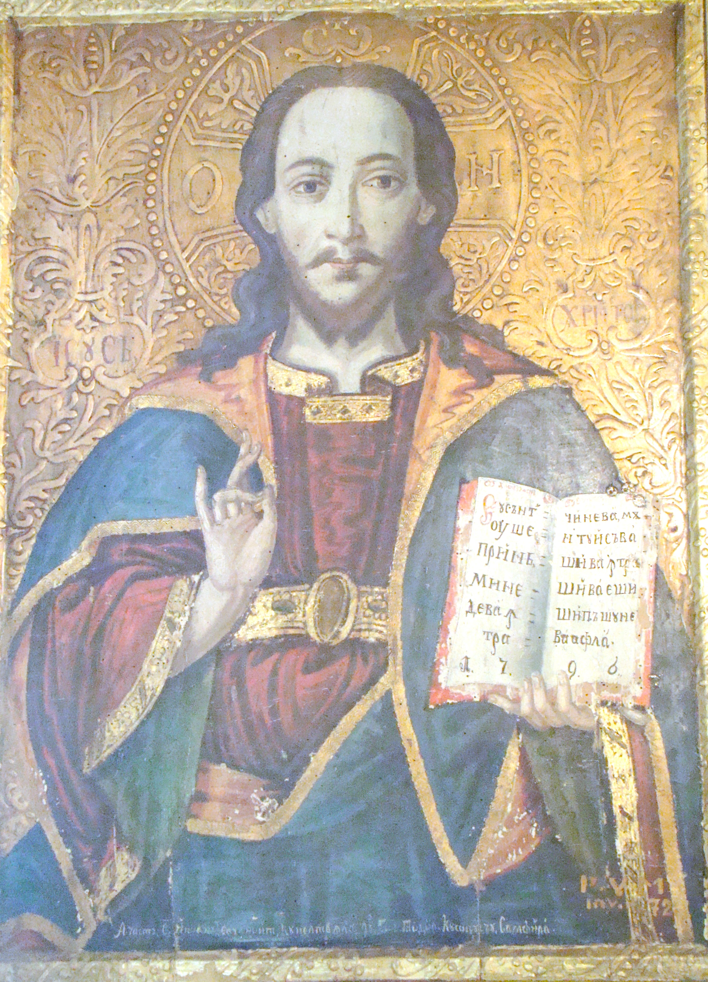 Biserica „Sf. Arhangheli”, sat Vidra; comuna Vidra